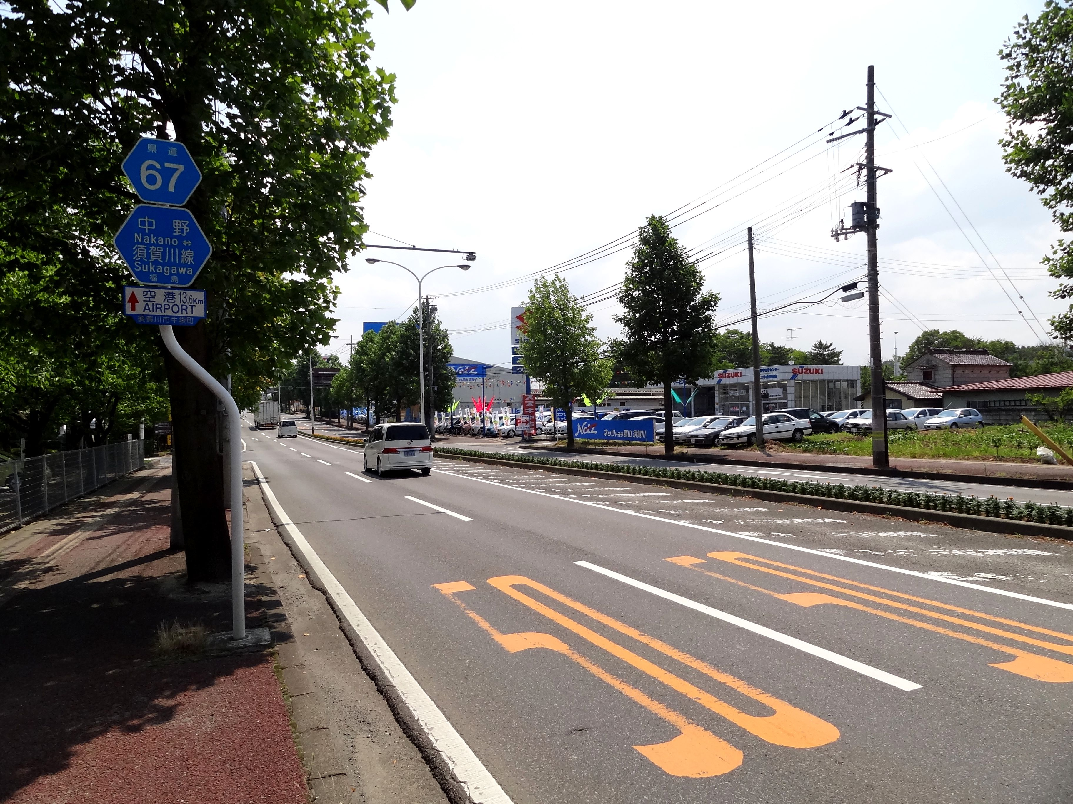 福島県道67号 須賀川市牛袋町付近